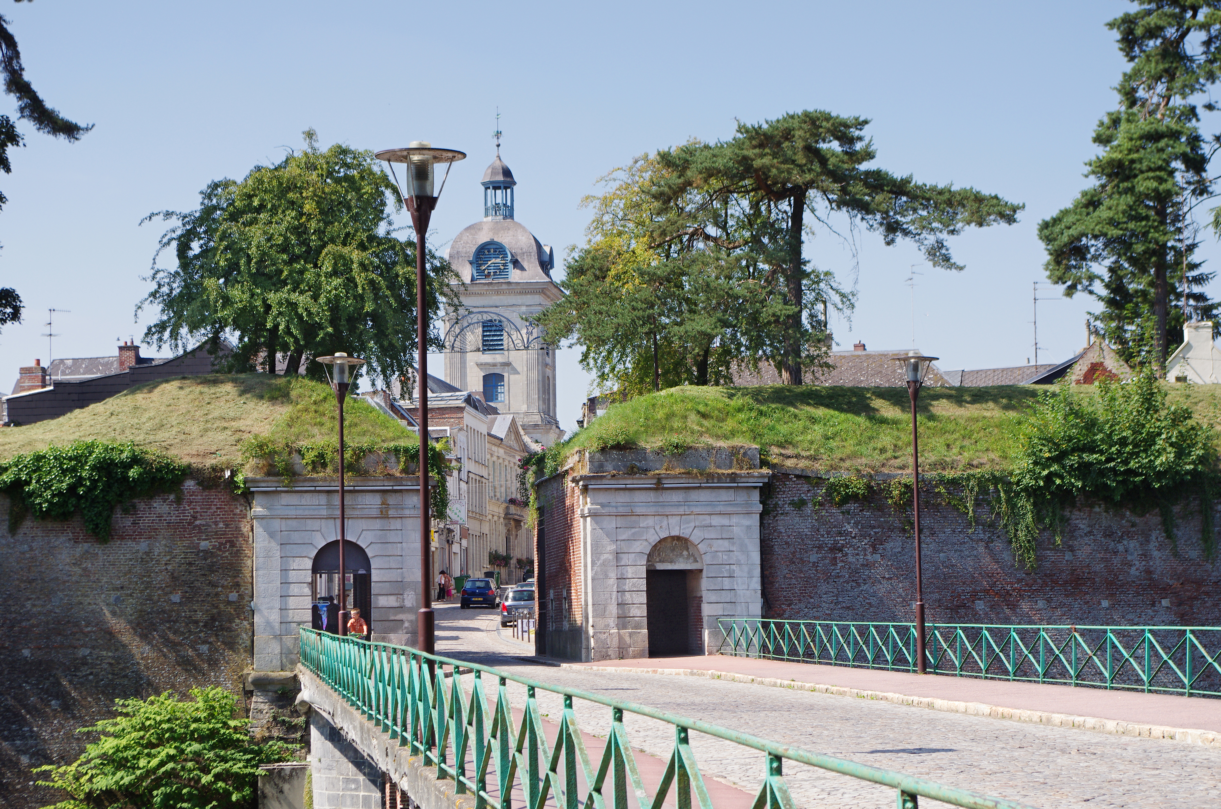 La Porte Faurœulx avec le Beffroi en arrière plan.